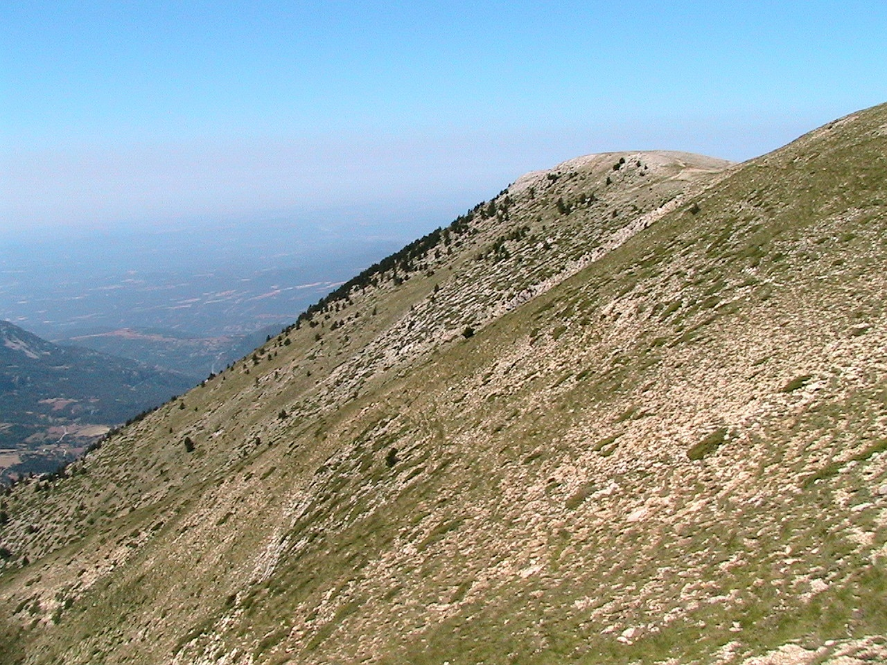 Inclinades vertents meridionals de la Gespeguera, al Port del Comte (Solsonès - Catalunya)